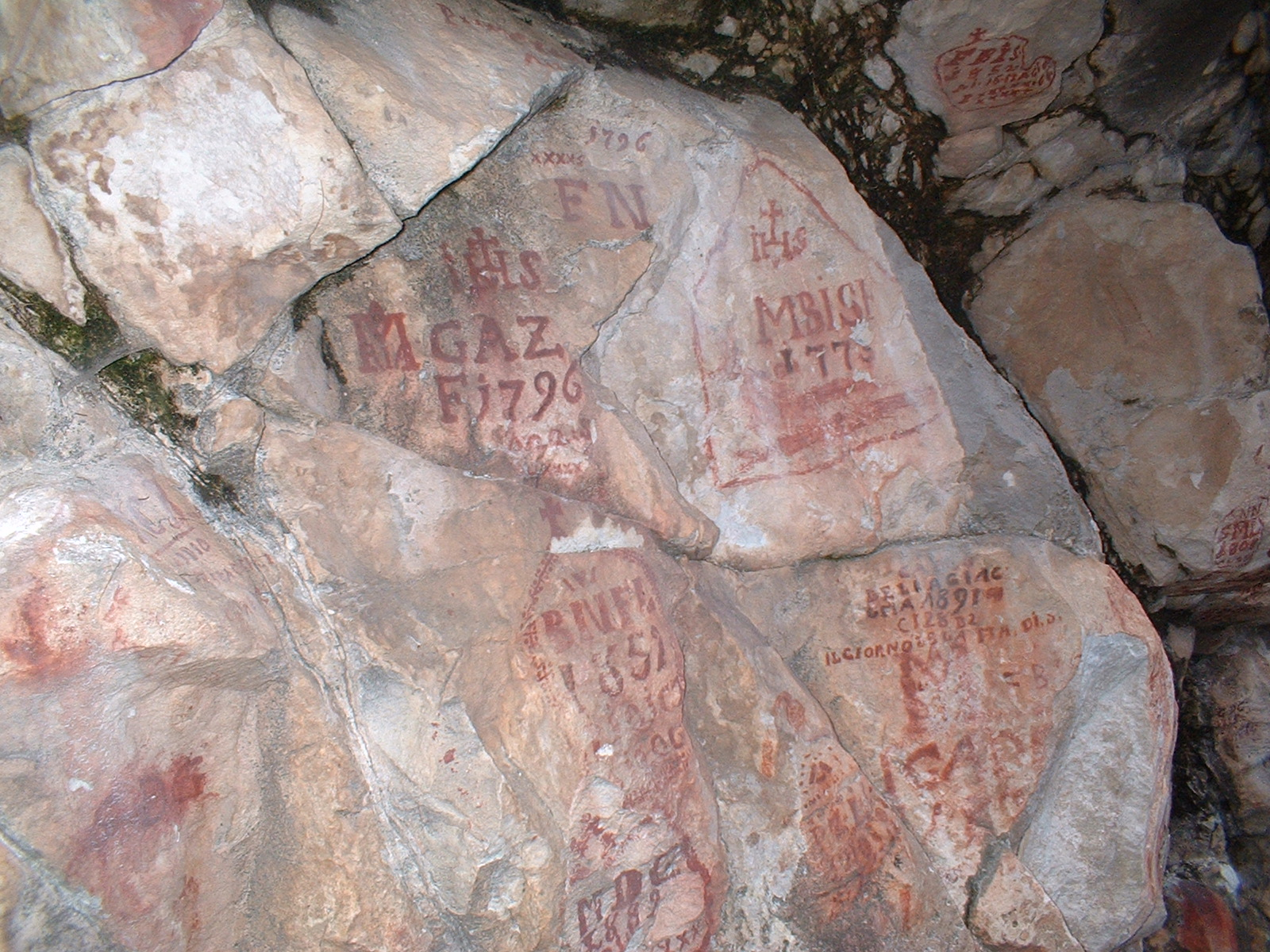 Incisioni rupestri di pastori lungo il sentiero che da Predazzo sale al Monte Agnello Sono l'autore della foto. Autore: Logudro. Data: 24/08/05.